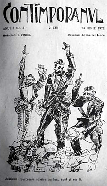 Caricatură a lui Marcel Iancu apărută pe coperta revistei Contimporanu, reprezentându-i pe Fraţii Brătianu